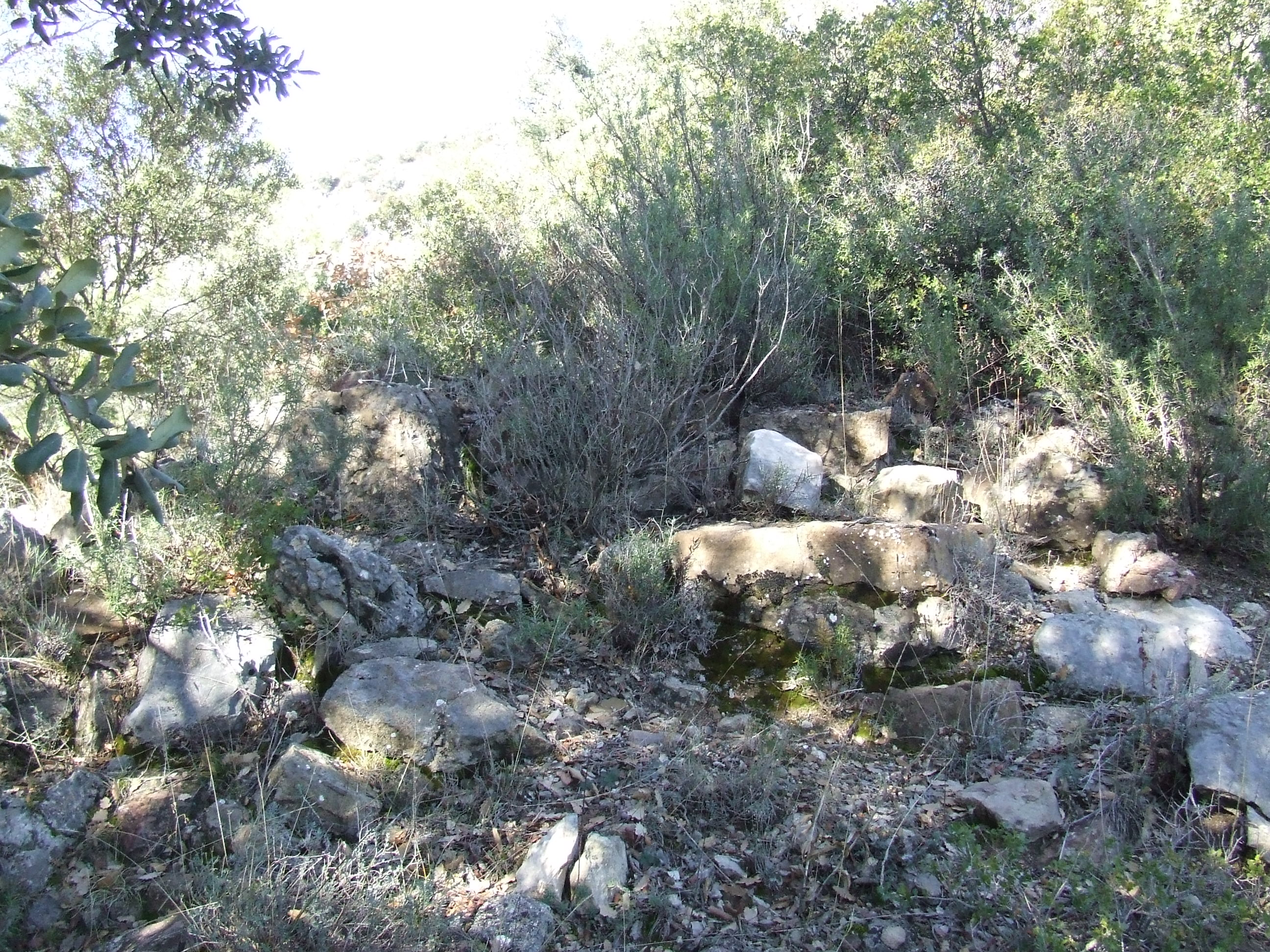 Sant Miquel d'Abella de la Conca. Filades de pedres que en romanen (Abella de la Conca, Pallars Jussà)